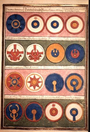 Magister Militum per Orientem page 2 from Notitia dignitatum